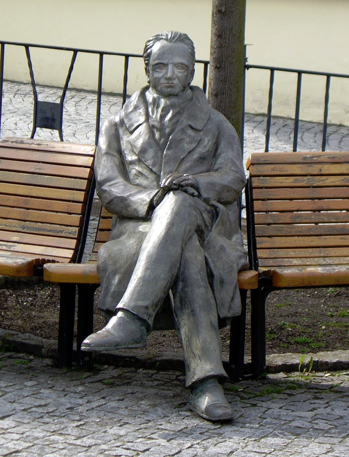 Das Goethe-Denkmal in Ilmenau am Ilmenauer Markt. Die Bronzefigur wurde vom Bildhauer Klaus Glutting aus Ilmenaus Partnerstadt Homburg gefertigt.